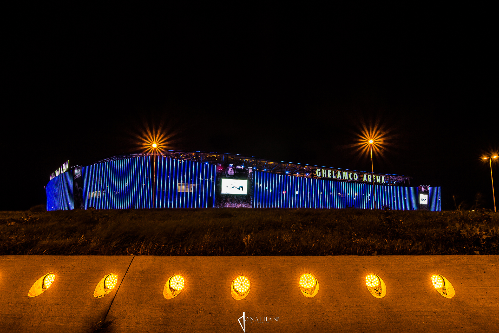 Stade ghelamco by night